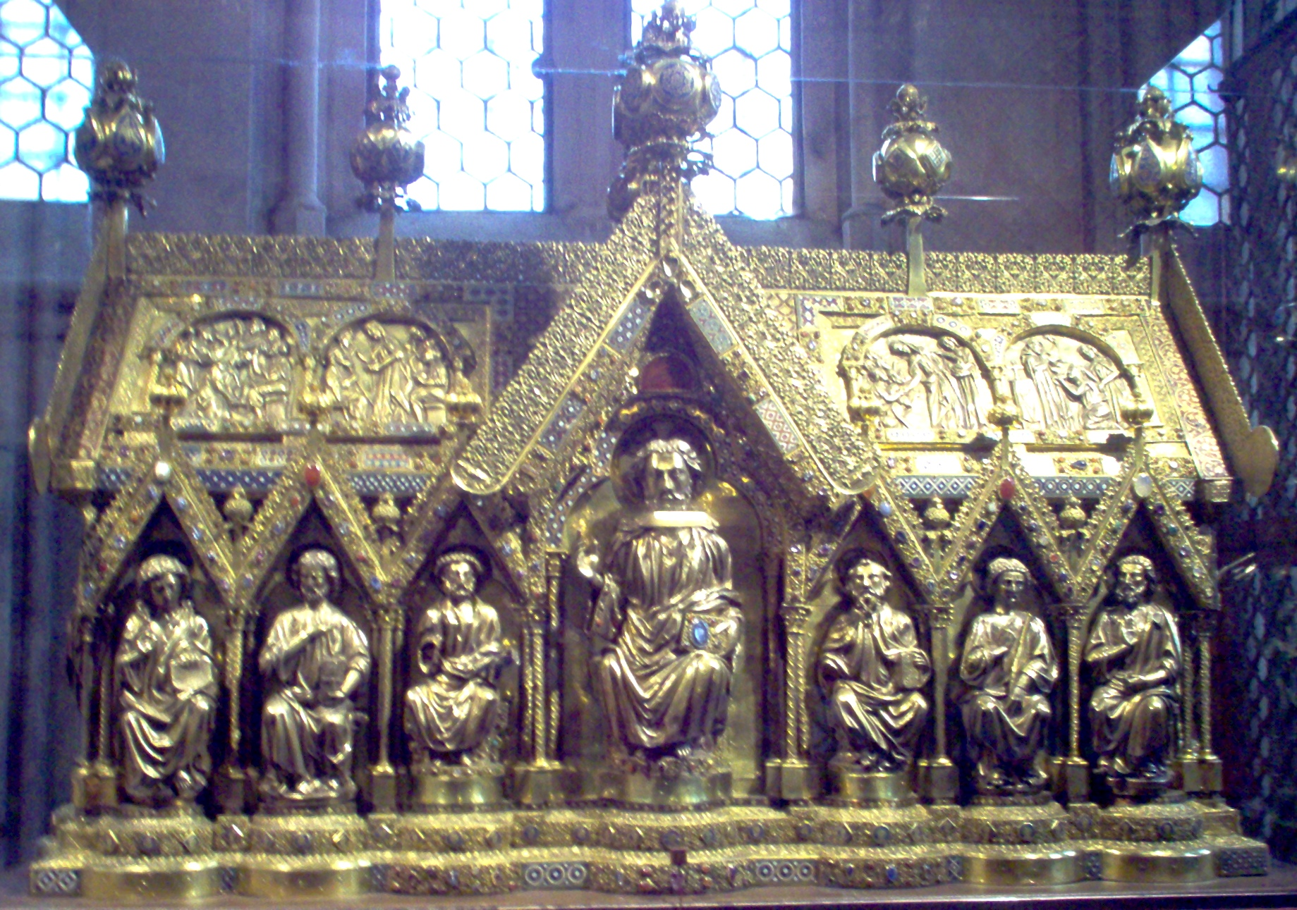 Kościół św. Elżbiety w Marburgu - złoty relikwiarz z około 1240 roku.